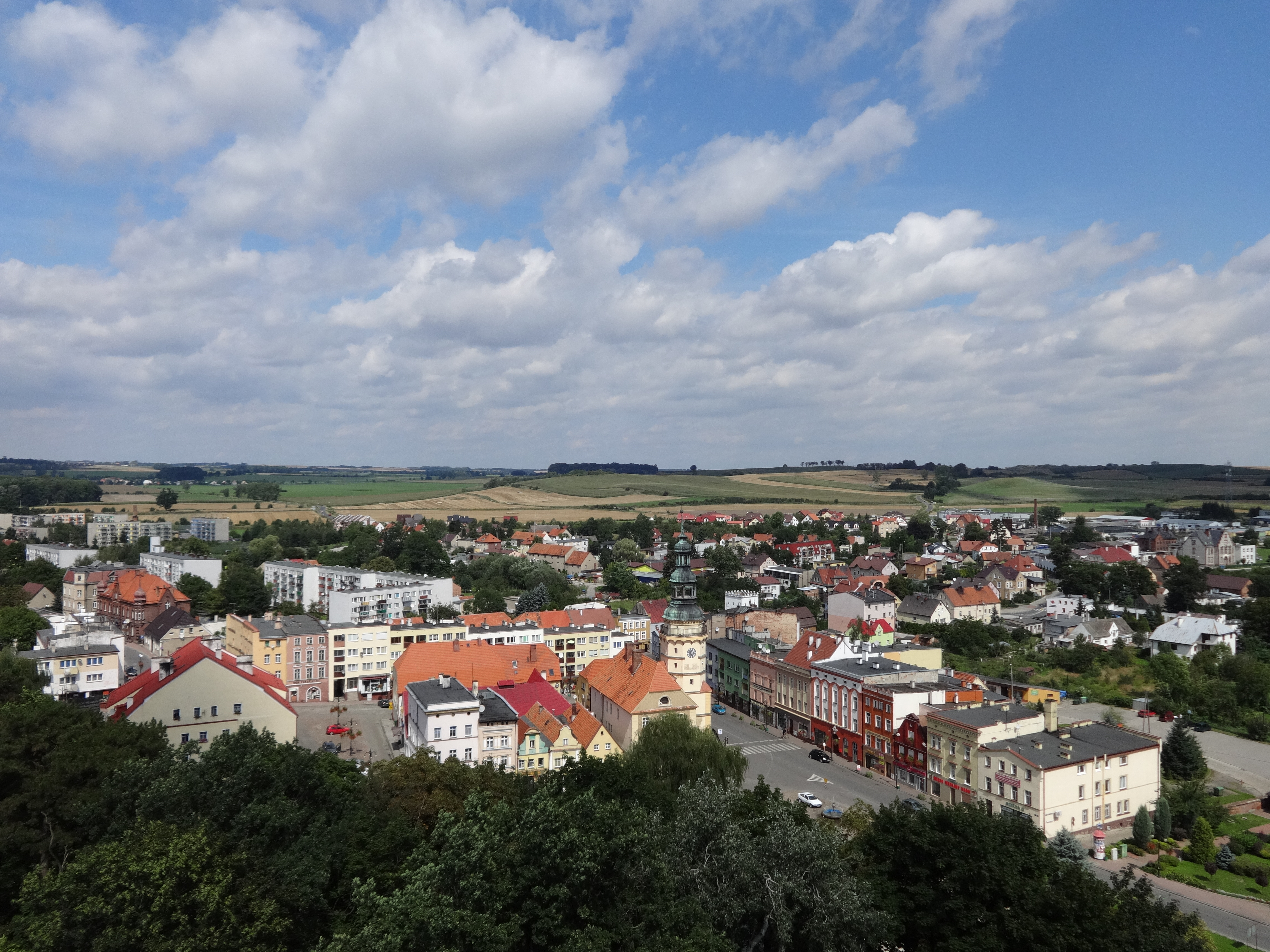 Otmuchów, układ urbanistyczny średniowiecznego założenia miasta